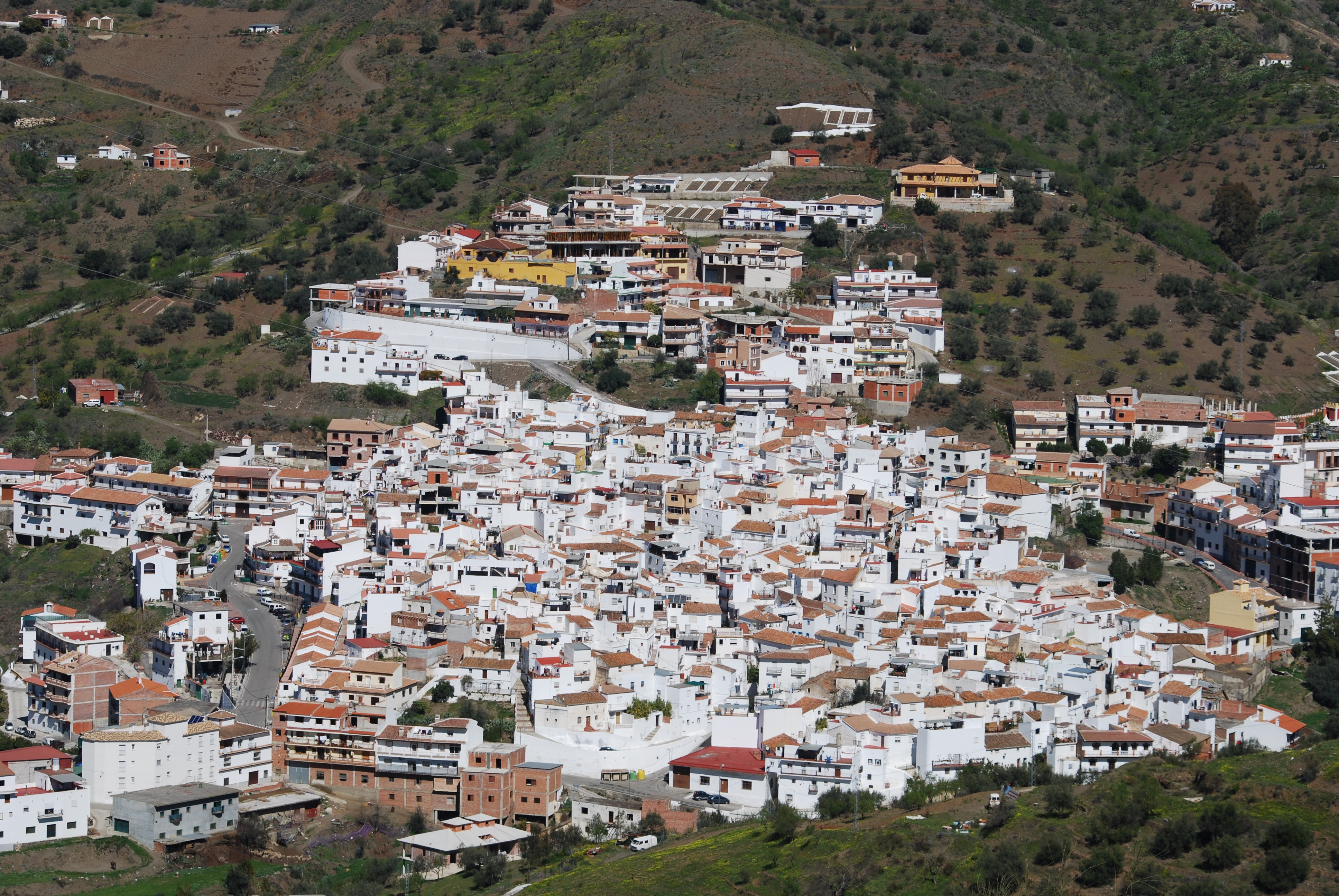 Arenas,Malaga